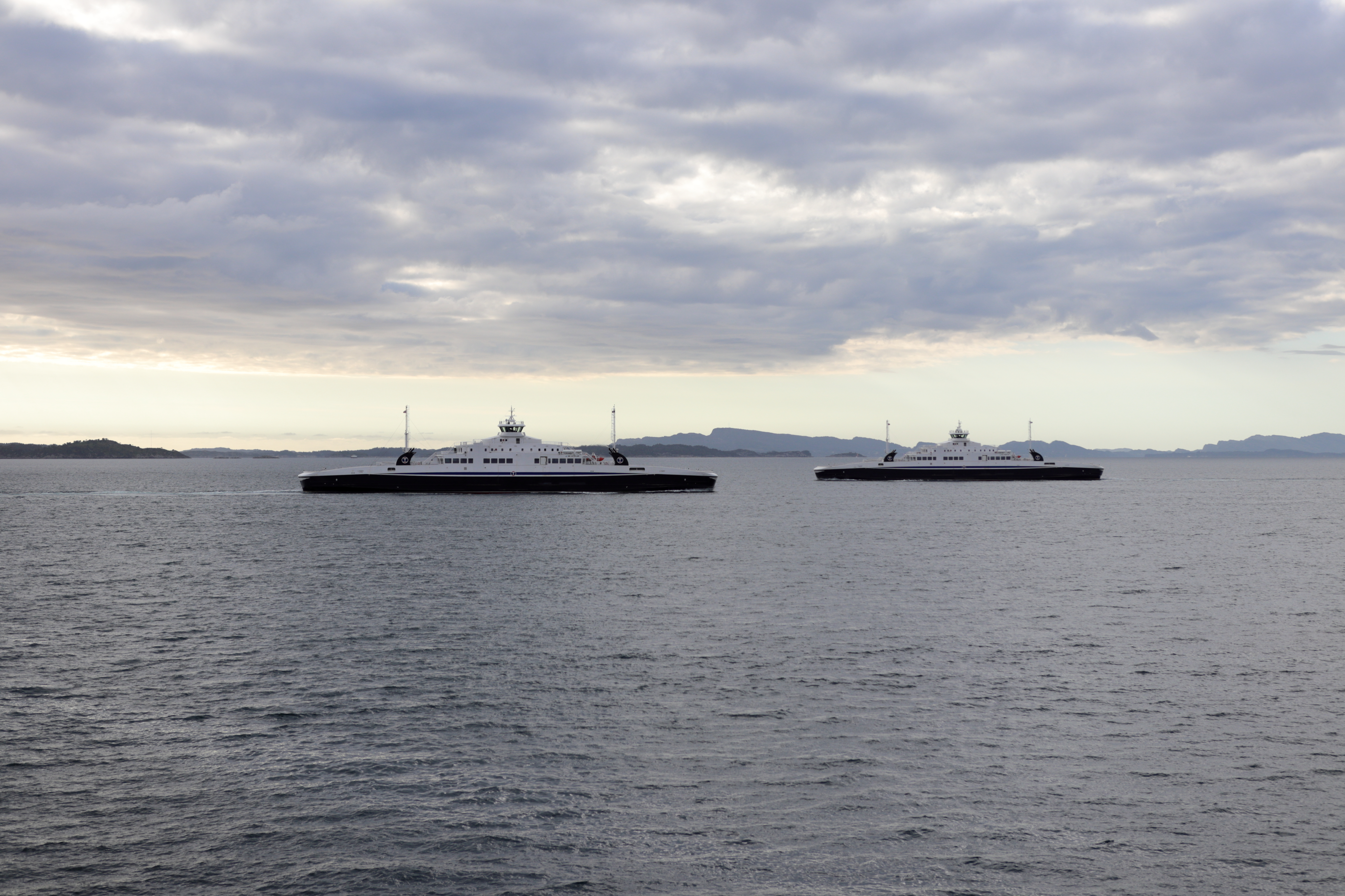 MF «Lysøy» møter systerferje utanfor Svarvhelleholmen